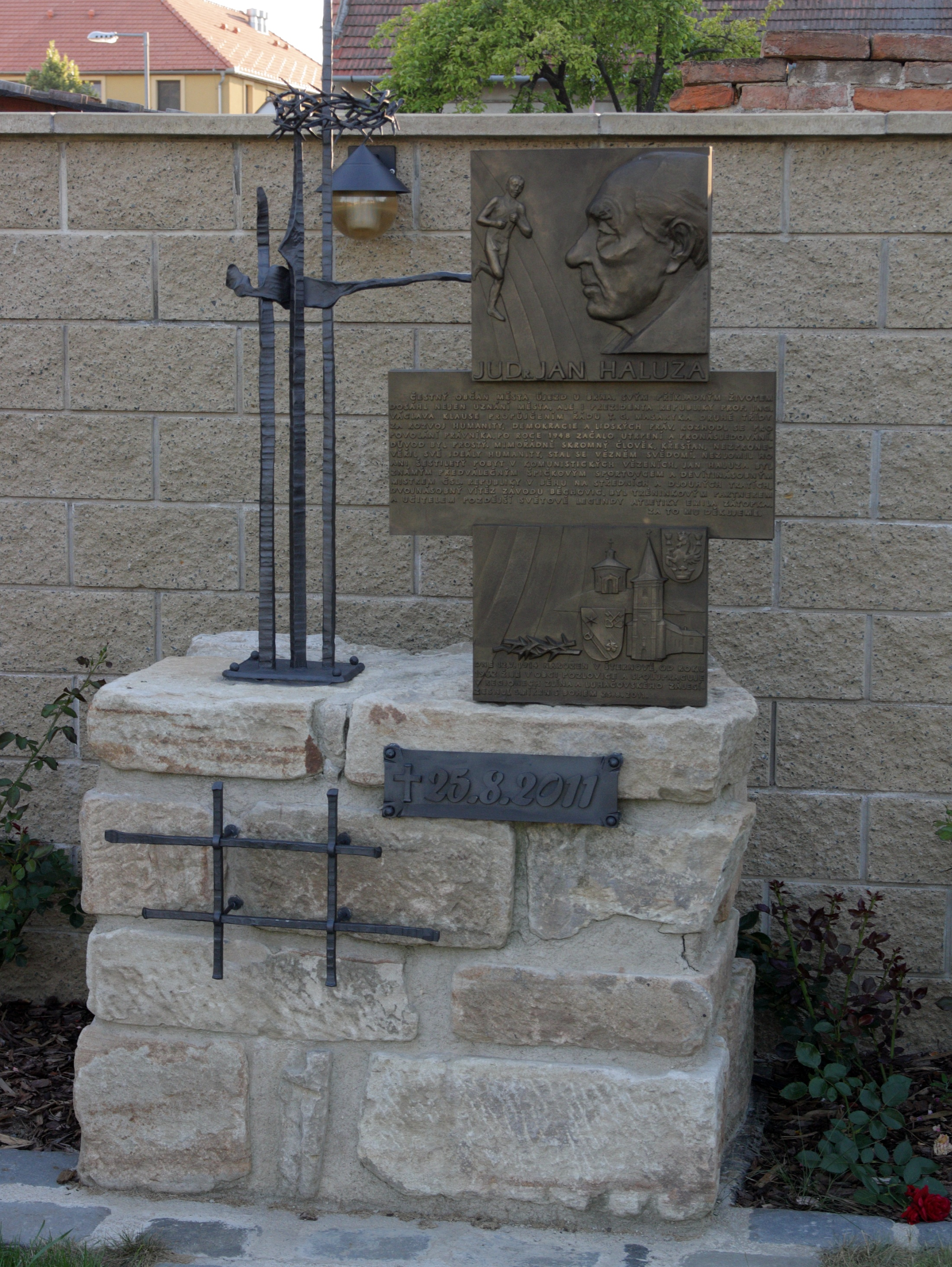 Újezd u Brna - pomník JUDr. Haluzovi.